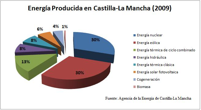 Gráfico sobre la producción de energía en 2009 en Castilla-La Mancha